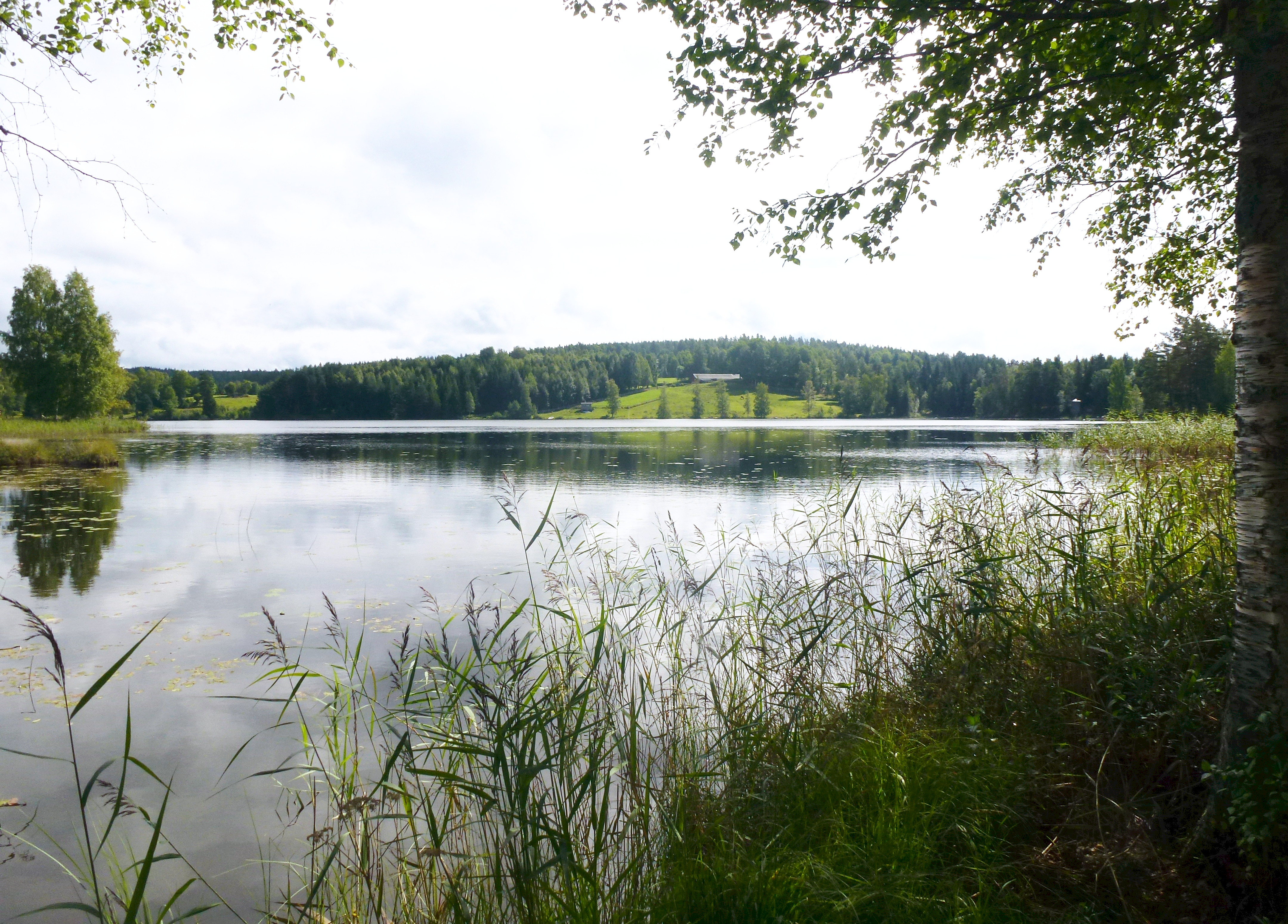 Burtjärnen vid Sörvik